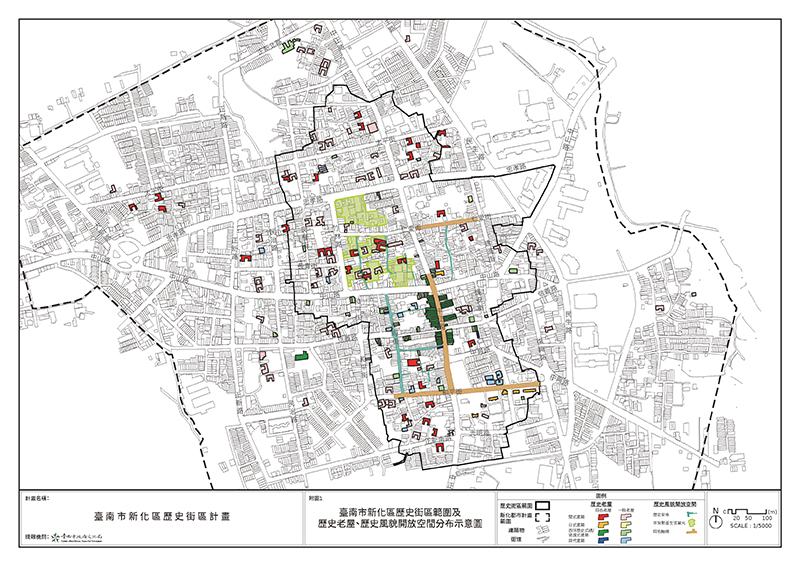 新化區歷史街區範圍